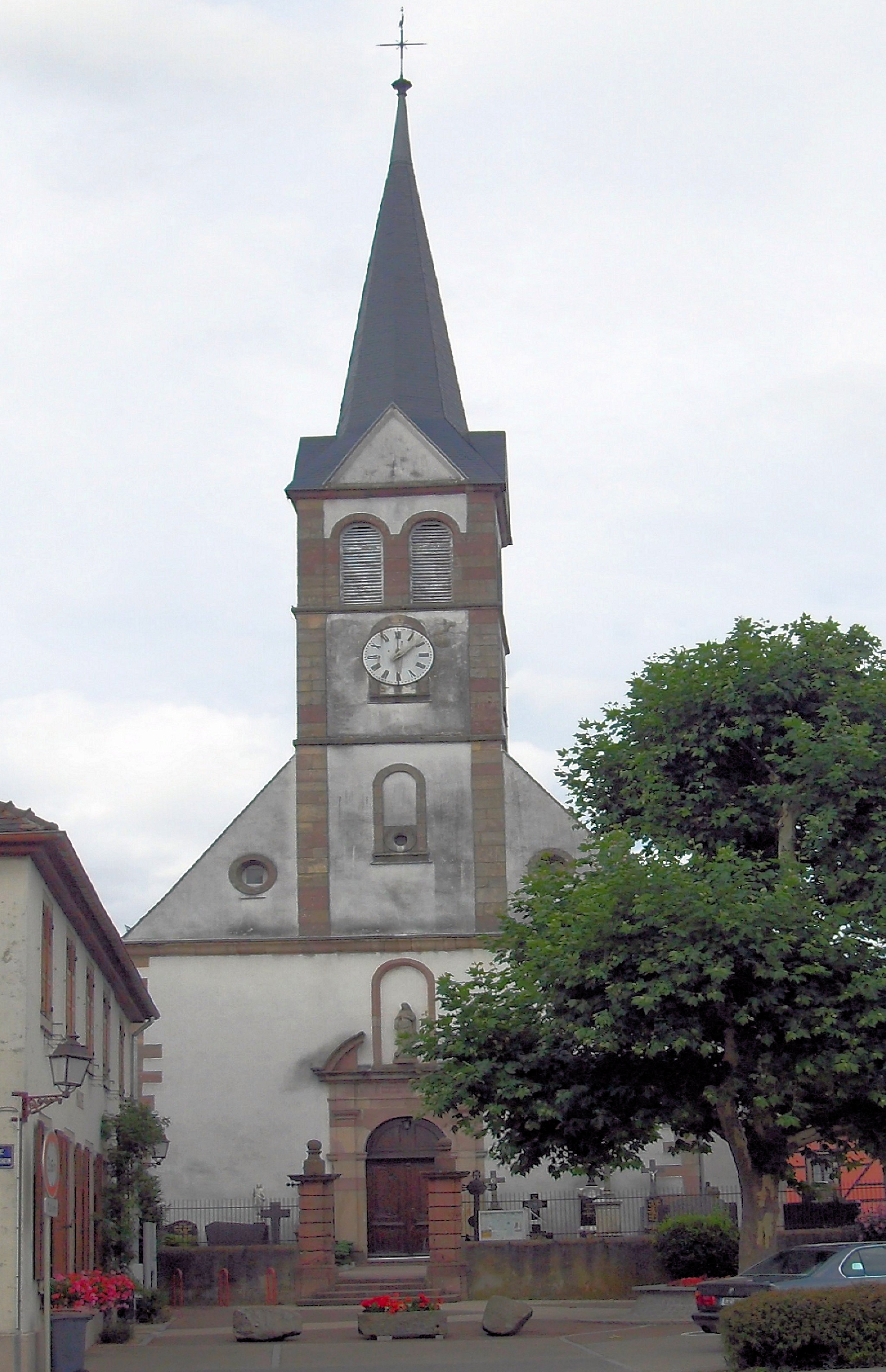 L'église Saint-Rémy á Feldkirch